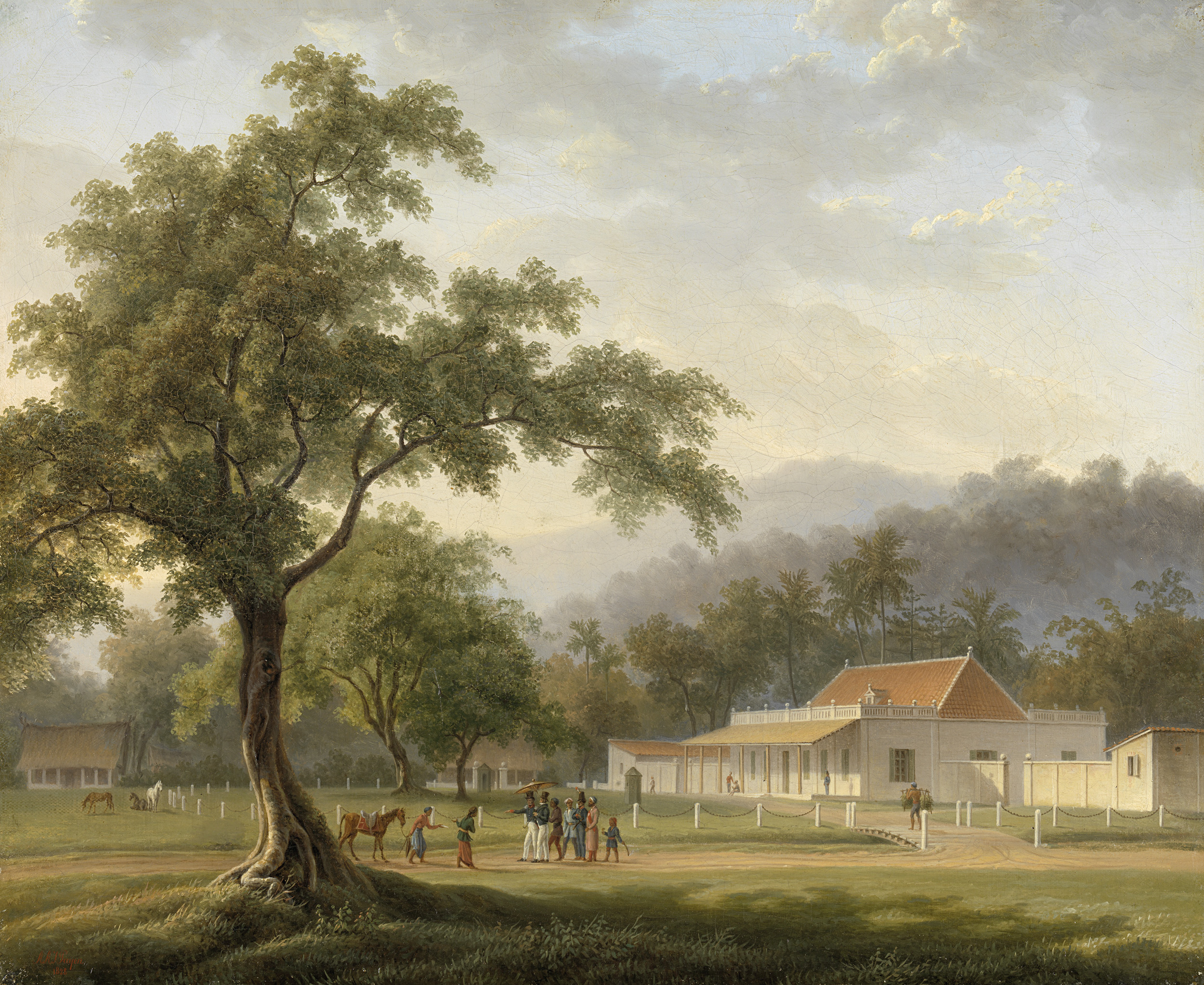 Indisch landschap met een gezicht op het huis van de resident te Banyuwangi op Oost-Java. Voor het huis een weiland met paarden. Op de oprit begroet de resident een inlandse bediende met een Javaanse koerier. Links een grote boom, achter het huis staan palmen en andere tropische bomen.